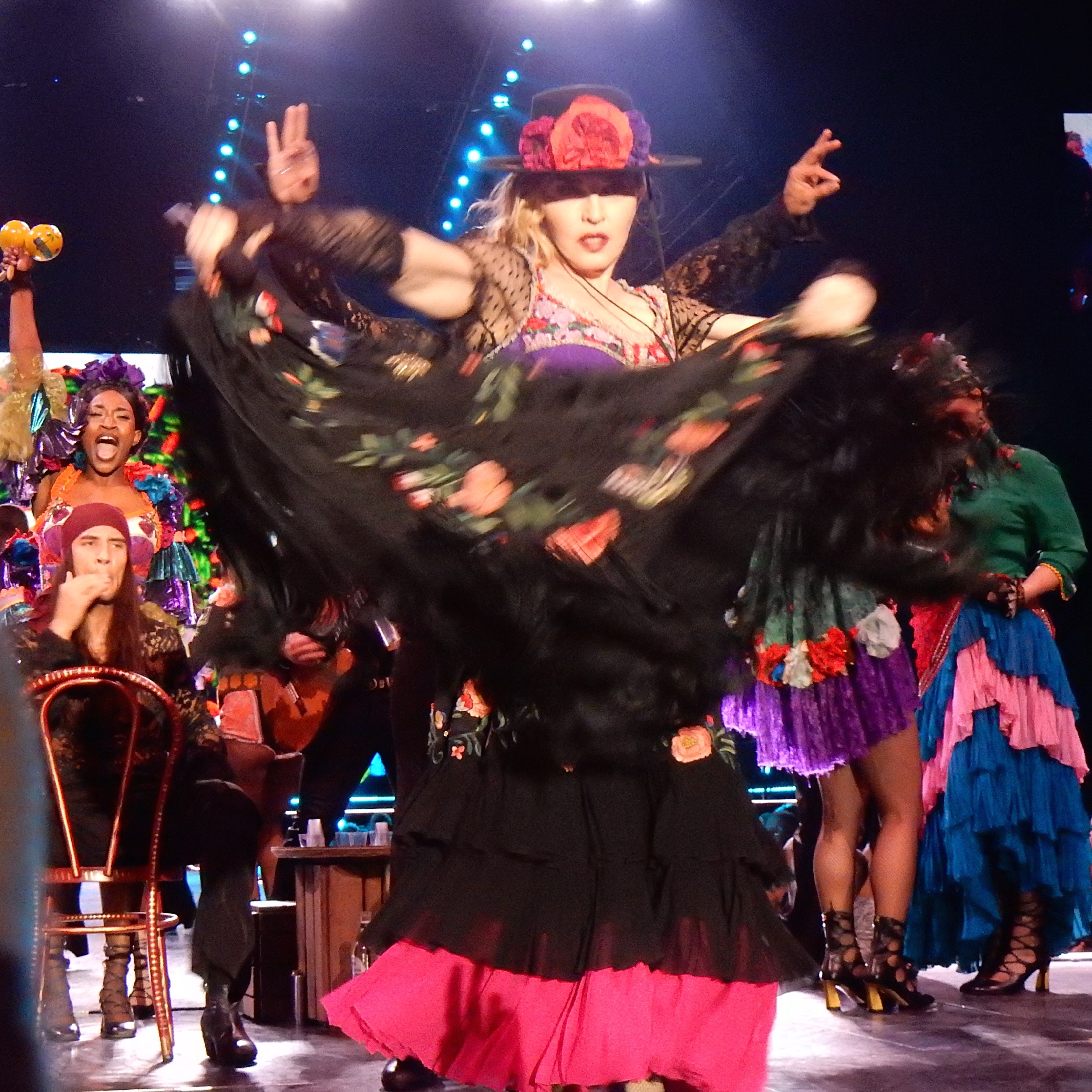 Madonna Rebel Heart Tour 2015 - Stockholm